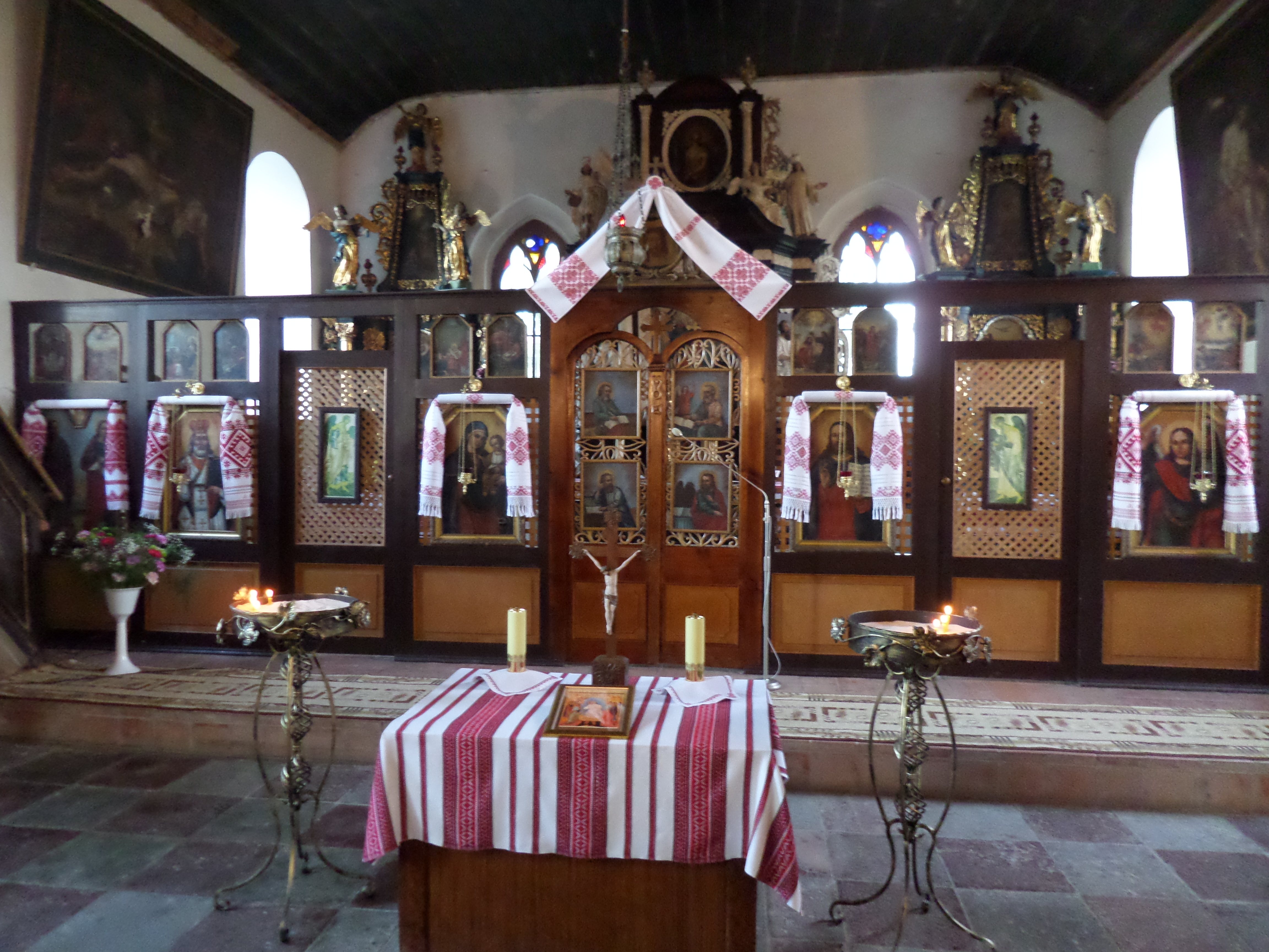 Ikonostas w cerkwii św. Mikołaja, fot. A. Paprot